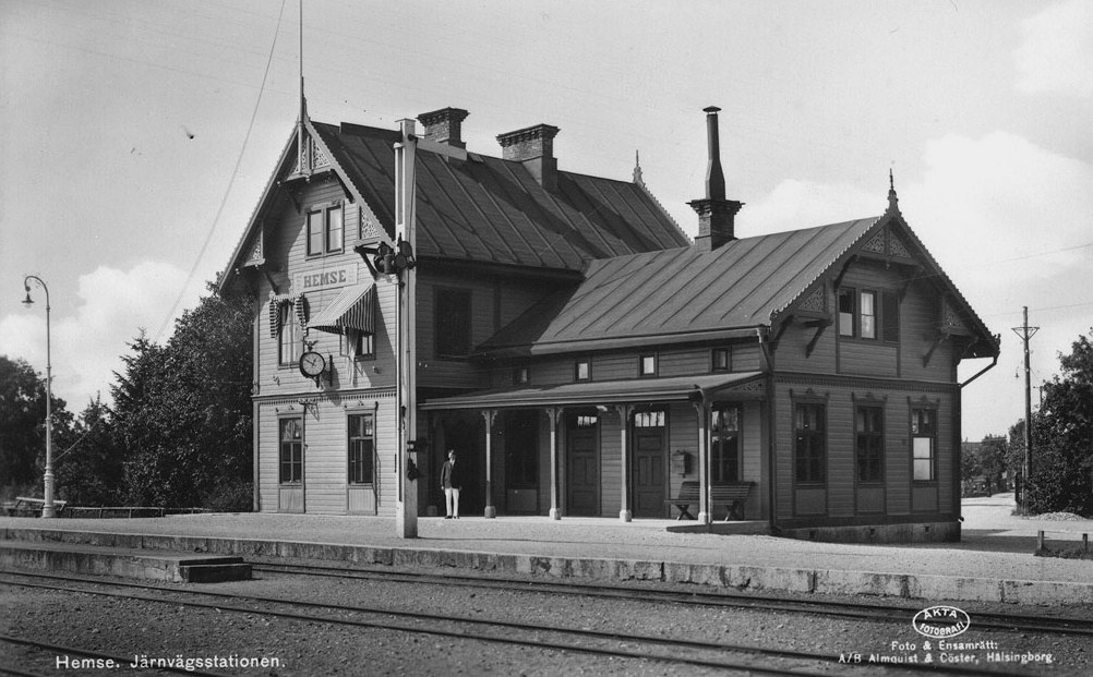 Järnägsstationen i Hemse utmed Gotlands järnväg (GJ) i det äldre träutförandet.